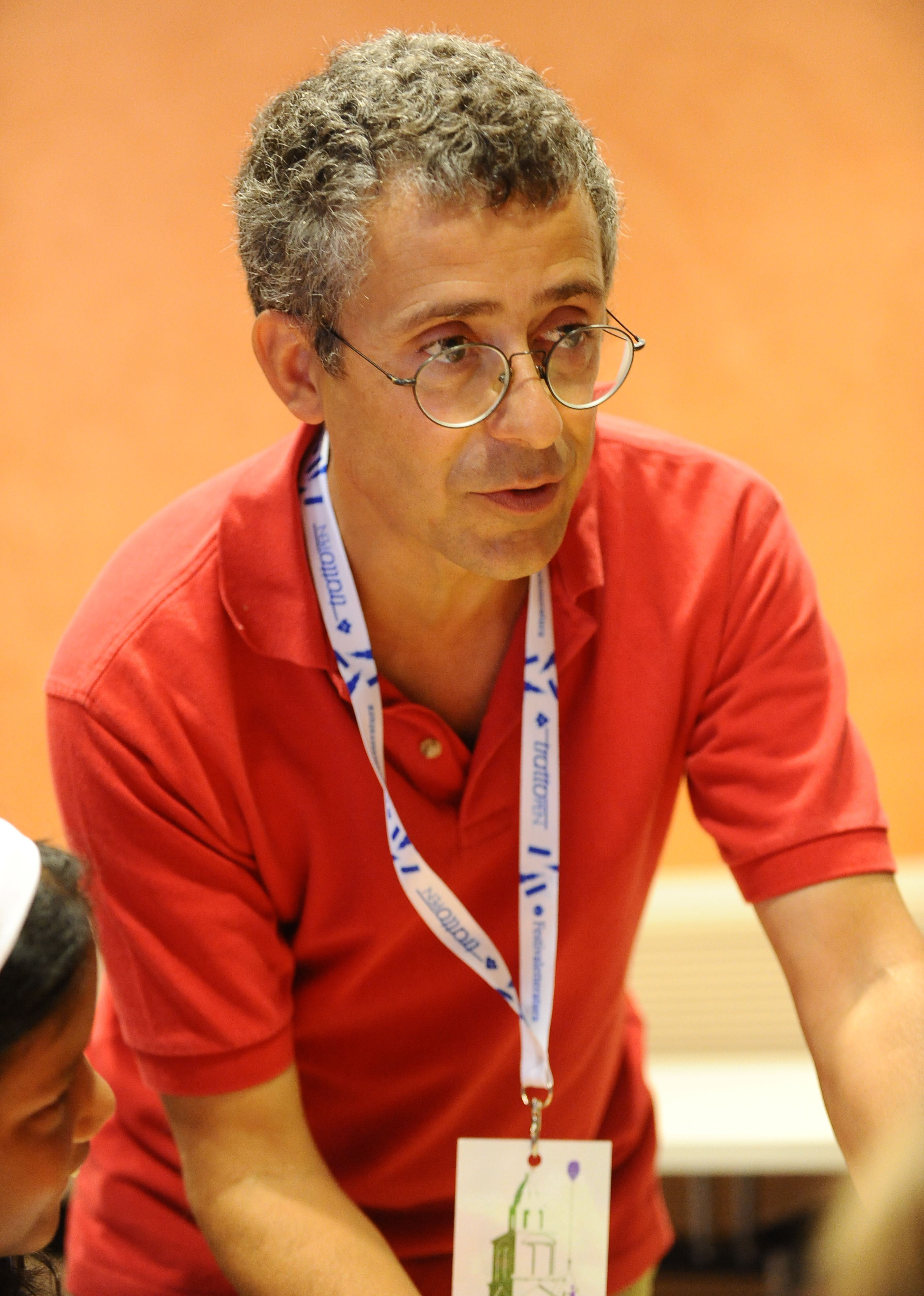 Simone Frasca a Mantova per il Festivaletteratura 2012.